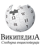 Wikipedia logo 2.0 (mk)